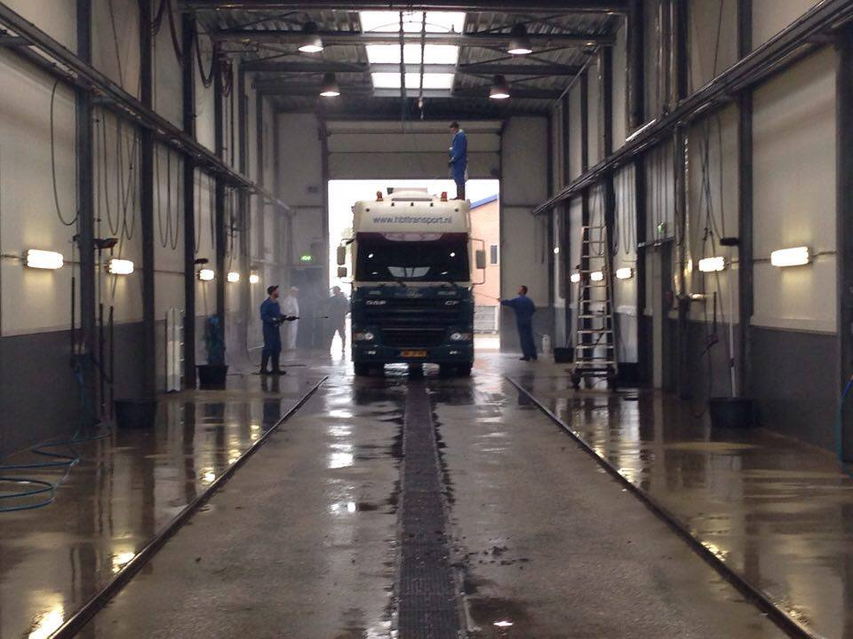 Barneveldi tankmosó